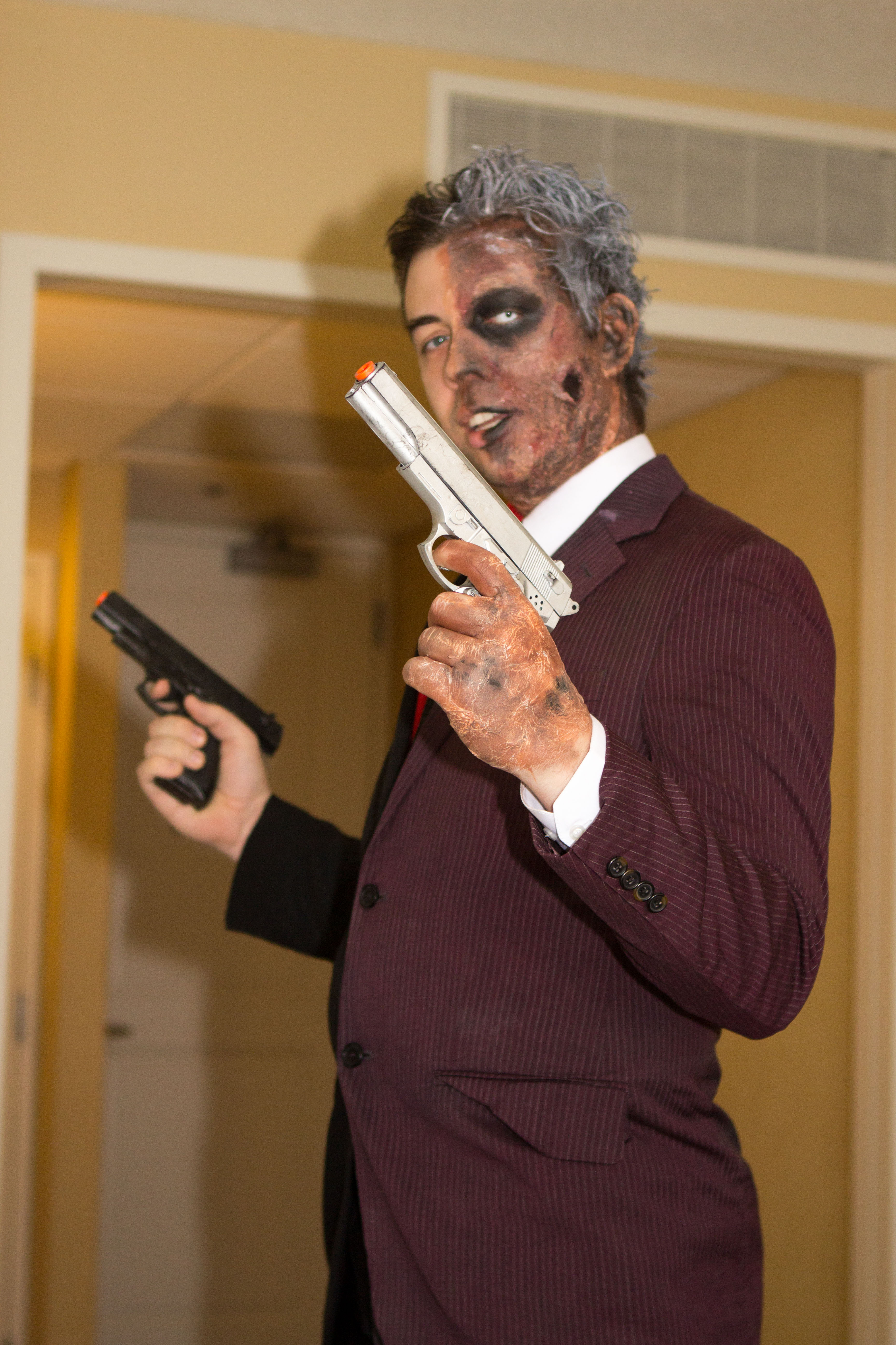 Cosplay at Dragon*Con 2013.